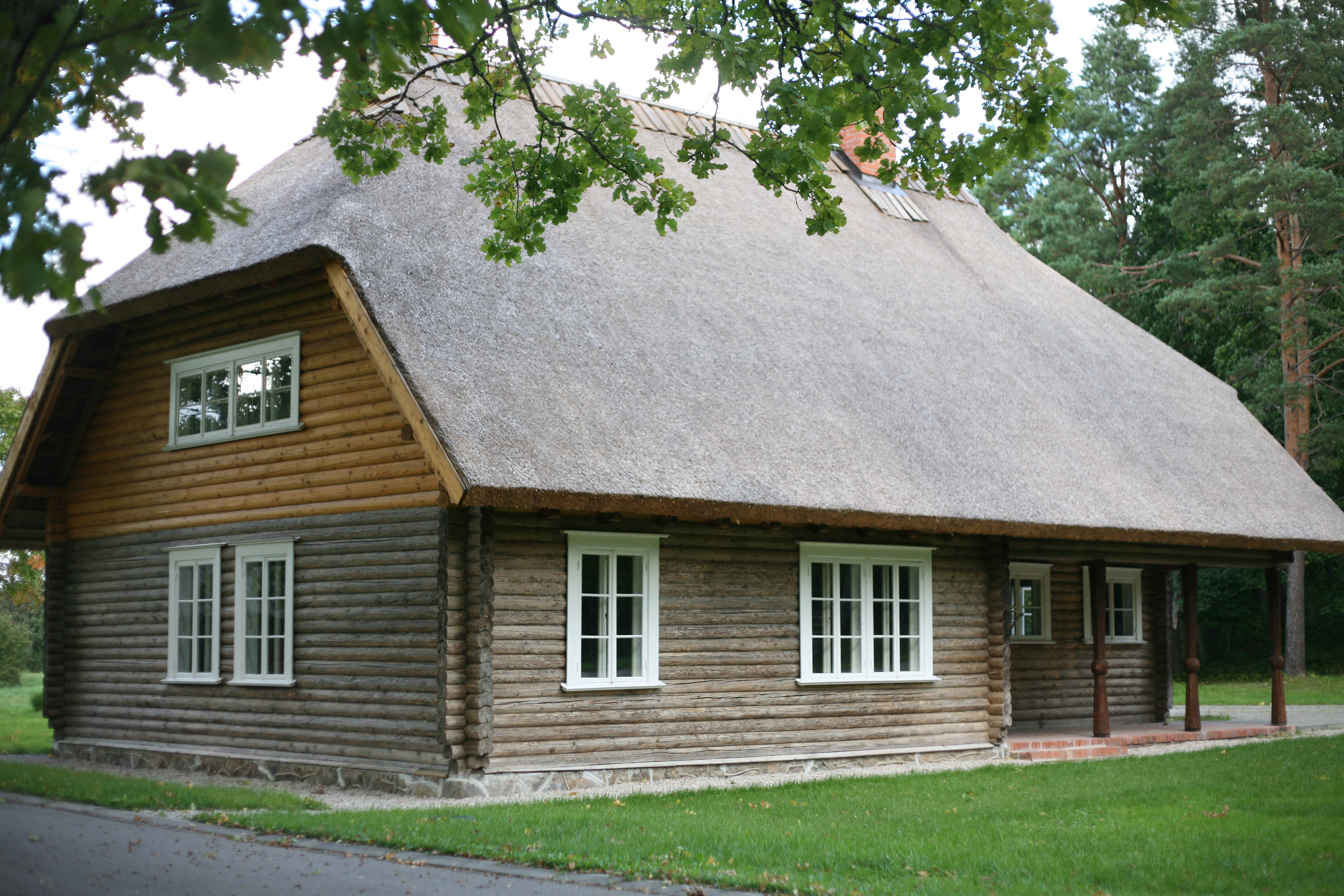 Oskara Kalpaka muzejs un piemiņas vieta Airītes. Arhitekts Artūrs Galindoms.